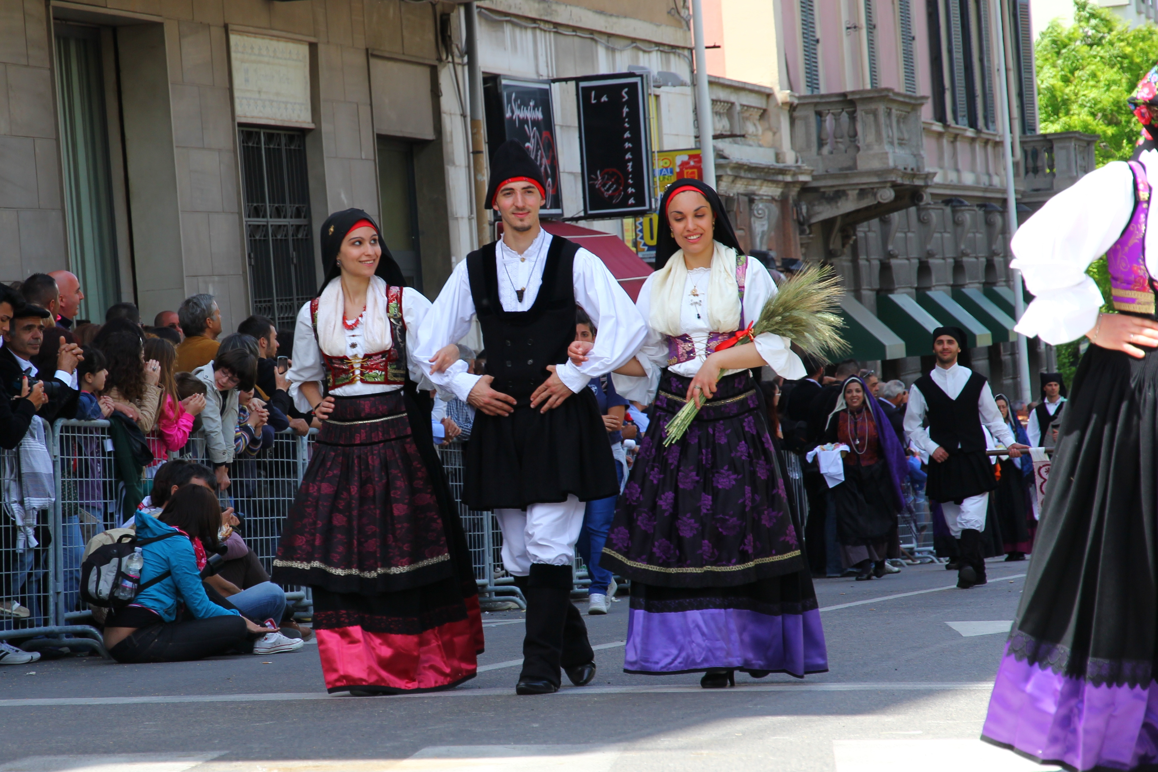 Cavalcata Sarda 2013 (Sassari)